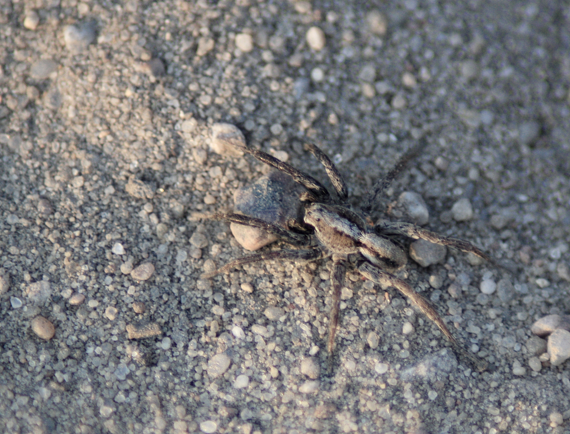 Unbekannte Spinne 1